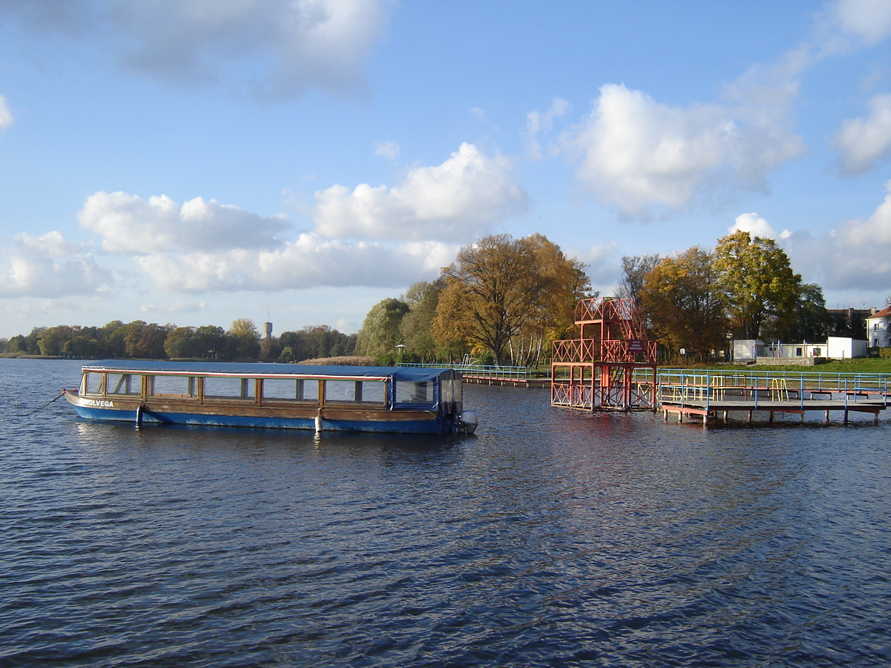 Stateczek "Wolwega" na jeziorze Kluki - dar od miasta partnerskiego Wolwega w Holandii.